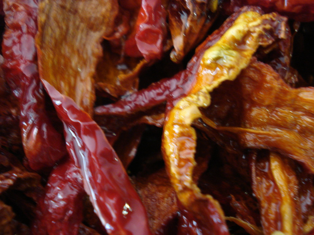 Peperoni Cruschi di Corleto Perticara (PZ)